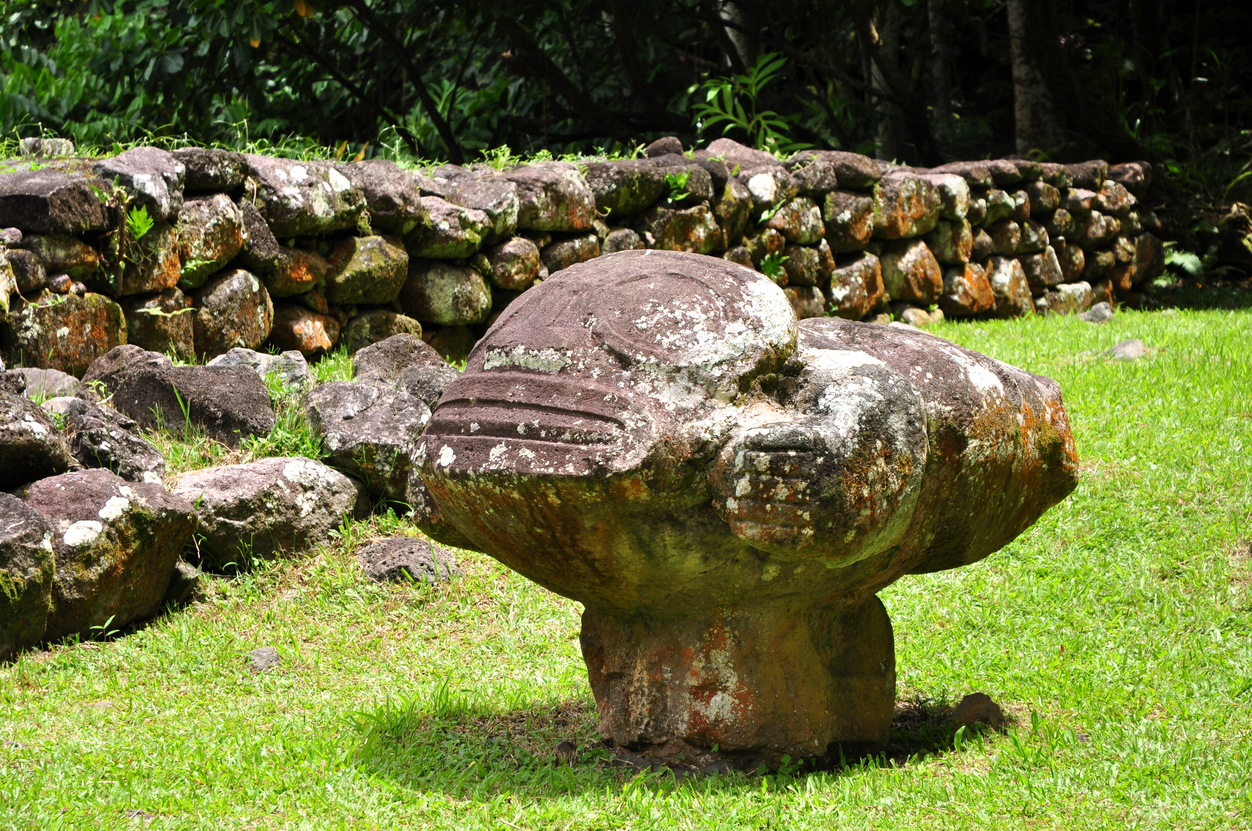 RtW2009 795 Iipona 'Flying' Tiki